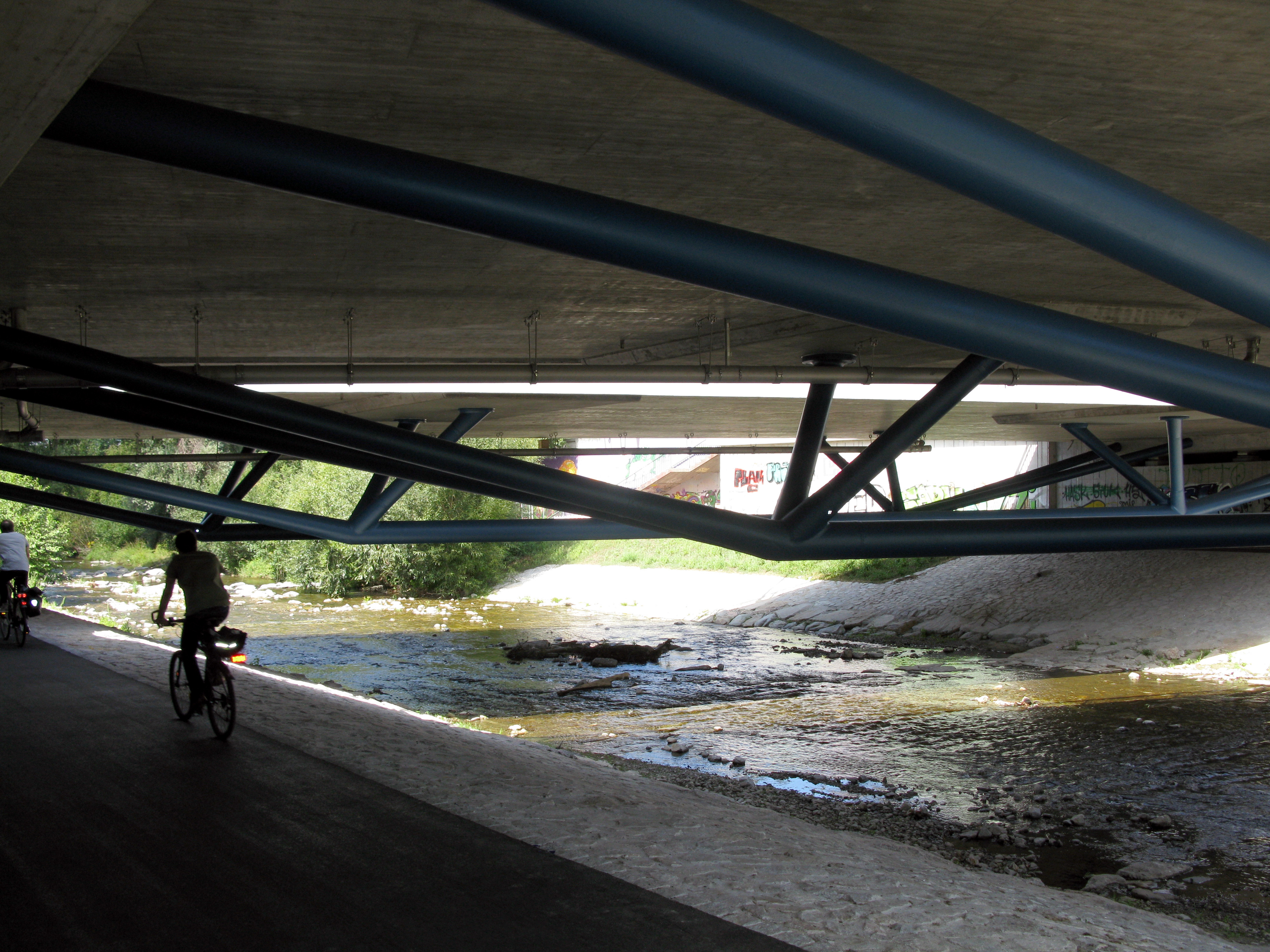 Neubau der Freiburger Kronenbrücke von unten